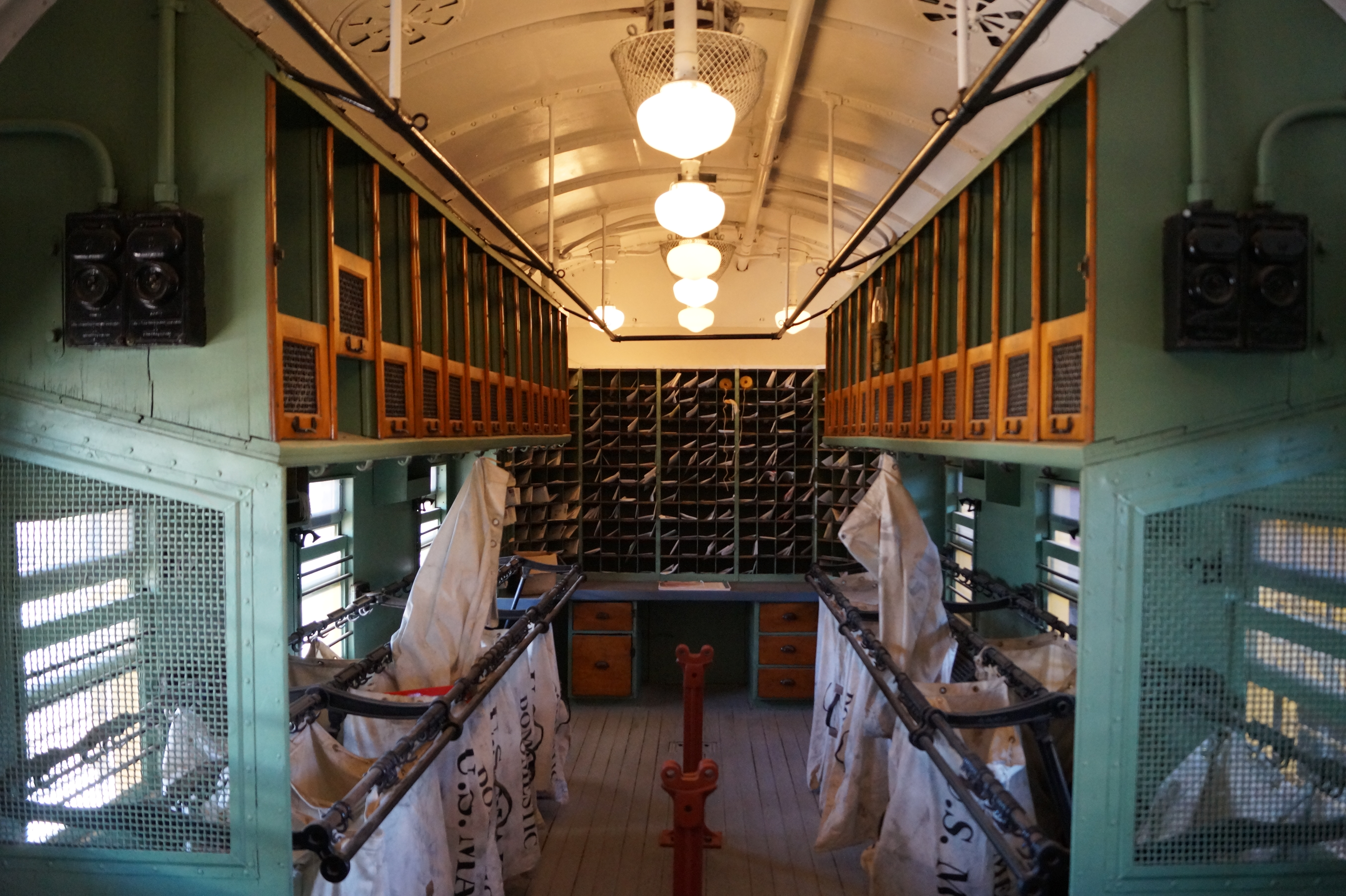 The Nevada State Railroad Museum which is an agency of the Nevada Department of Cultural Affairs. It is located at Yucca Street on the tracks of the historic Union Pacific Railroad branch Henderson-Boulder City near the former Boulder City Railroad Yards where the Hoover Dam construction equipment was unloaded in the 1930s.